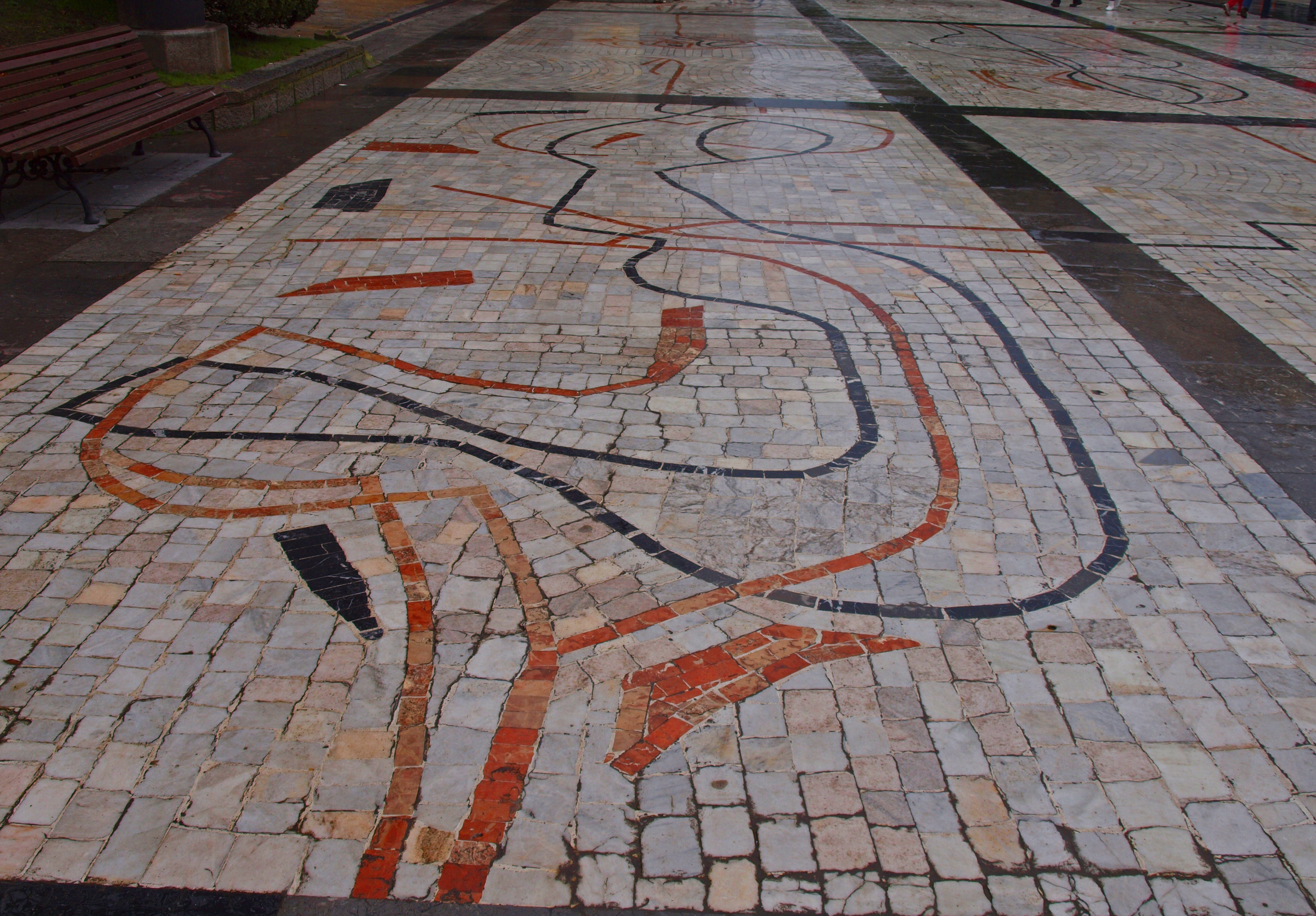 Pavimento del Paseo de los Álamos. Oviedo. Principado de Asturias. España. Mosaico obra de Antonio Suárez.